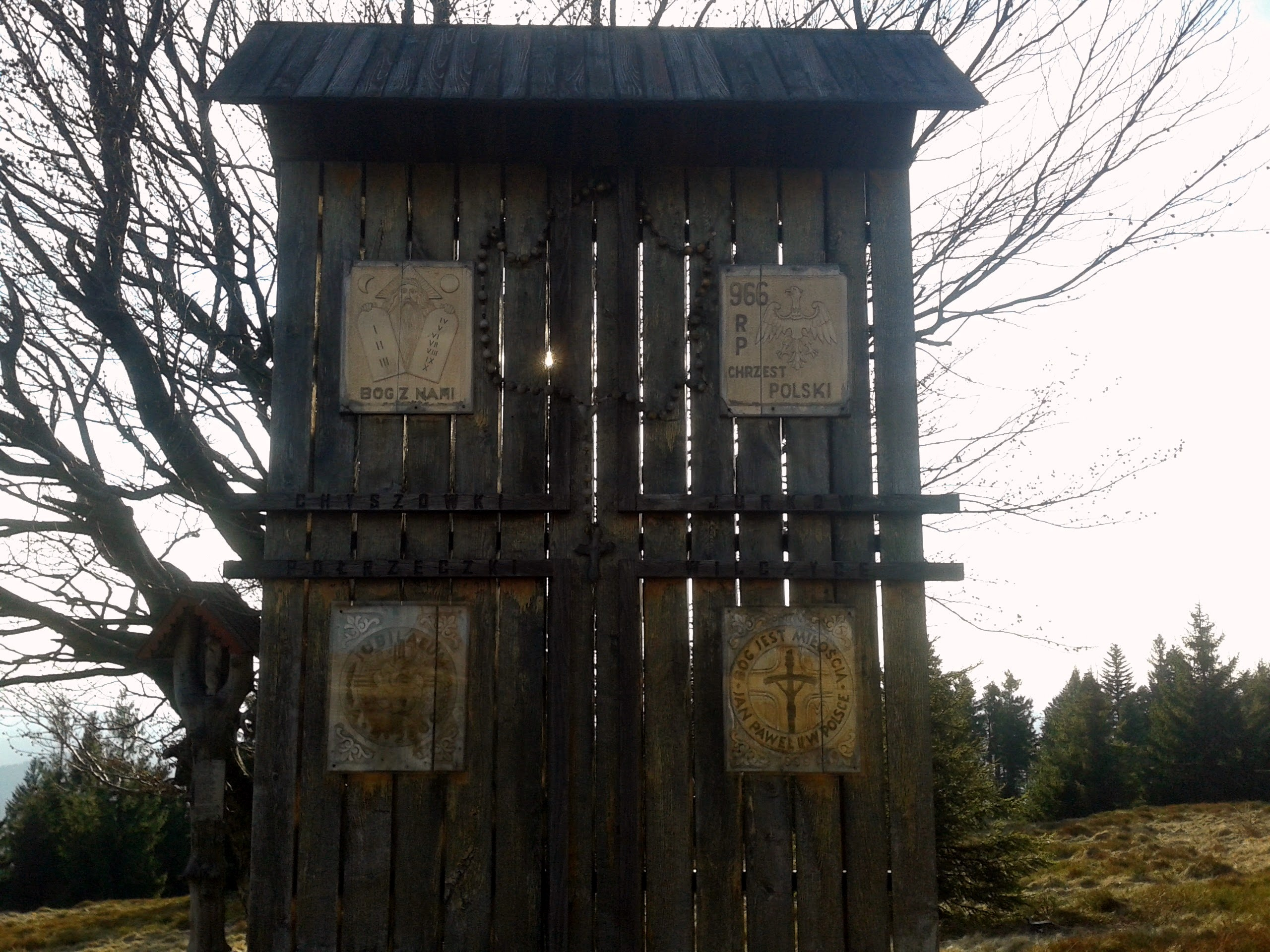 Tablica, które jest podzielona na 4 części. Każdej z nich odpowiada jedna nazwa miejscowości, która należy do parafii Jurków.